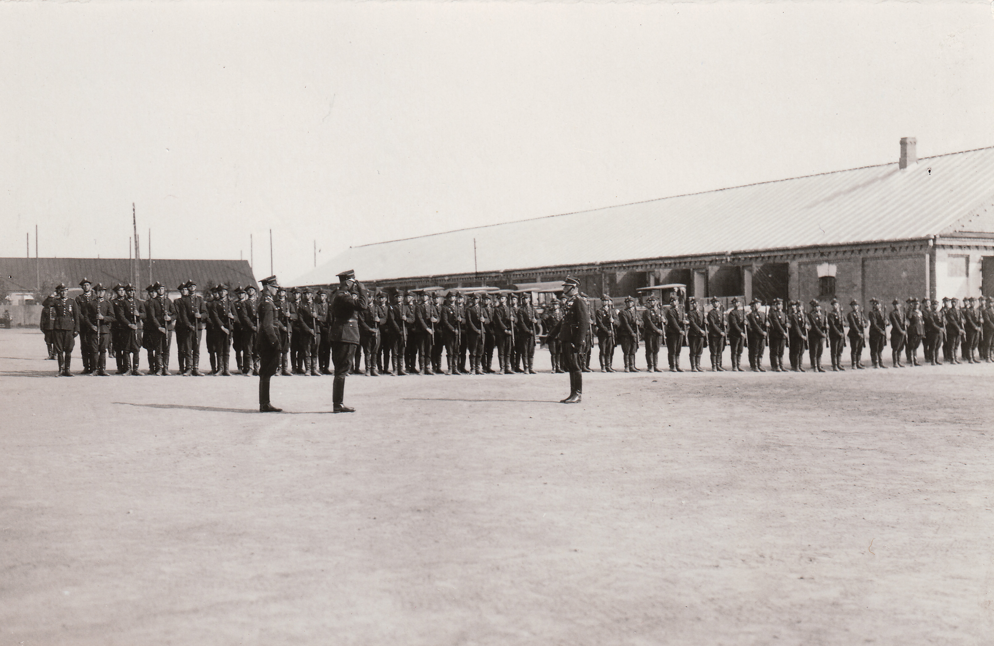 Brunon Błędzki w składa meldunek pułkownikowi w Szkole Chorążych w Toruniu